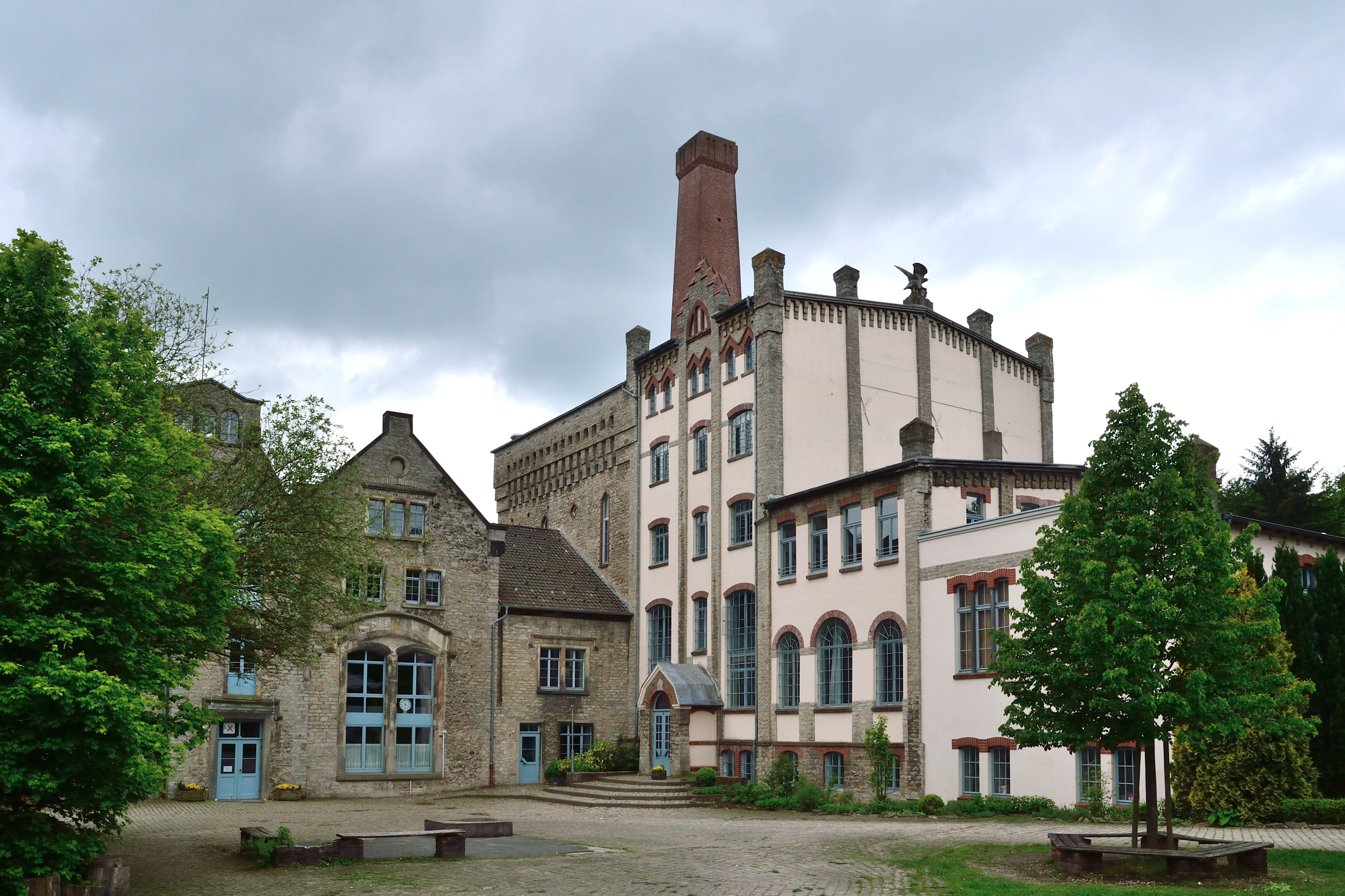 This is a photograph of an architectural monument. ehemalige Brauerei Falkenkrug, heute Waldorfschule